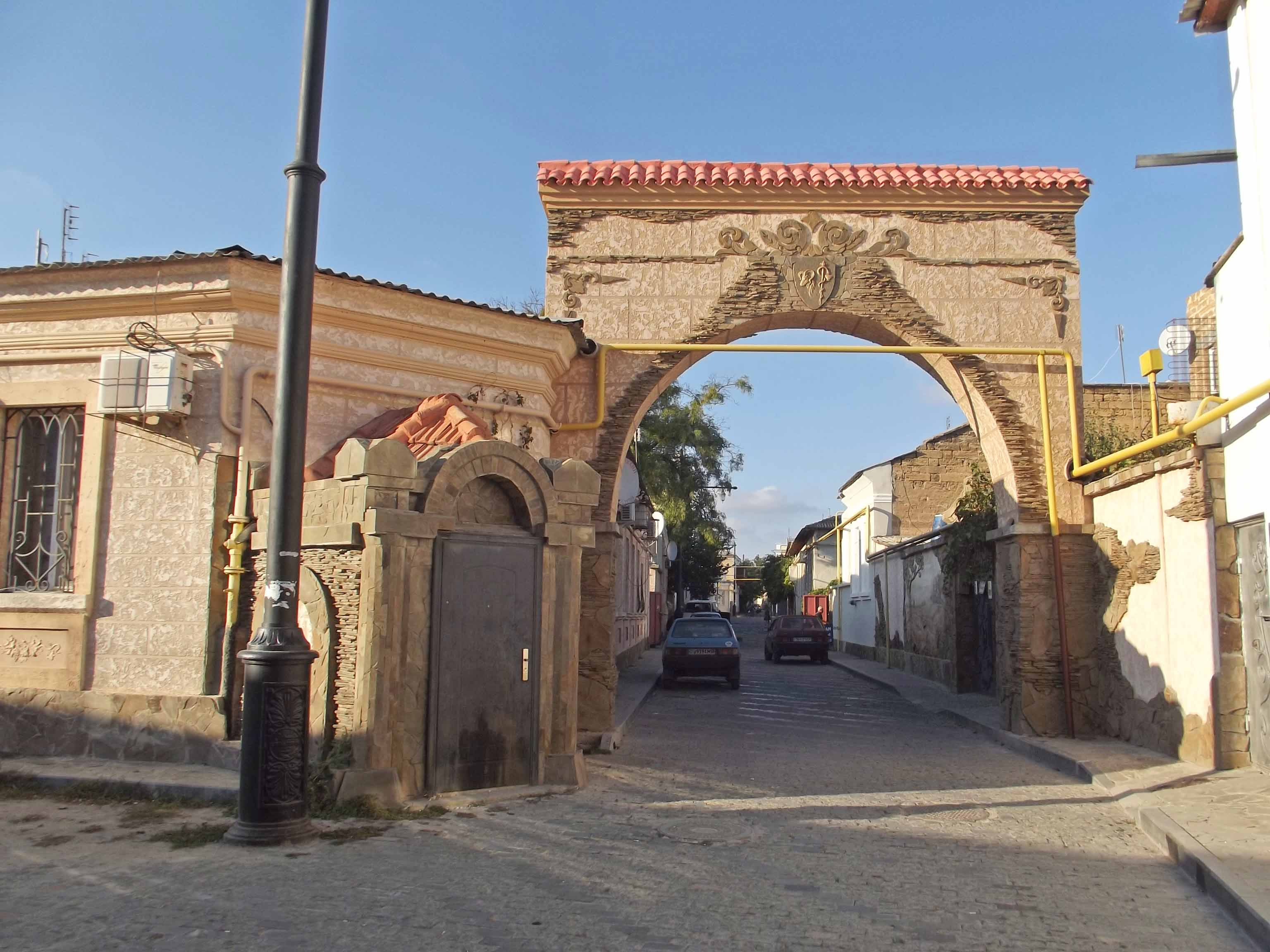 Старая арка